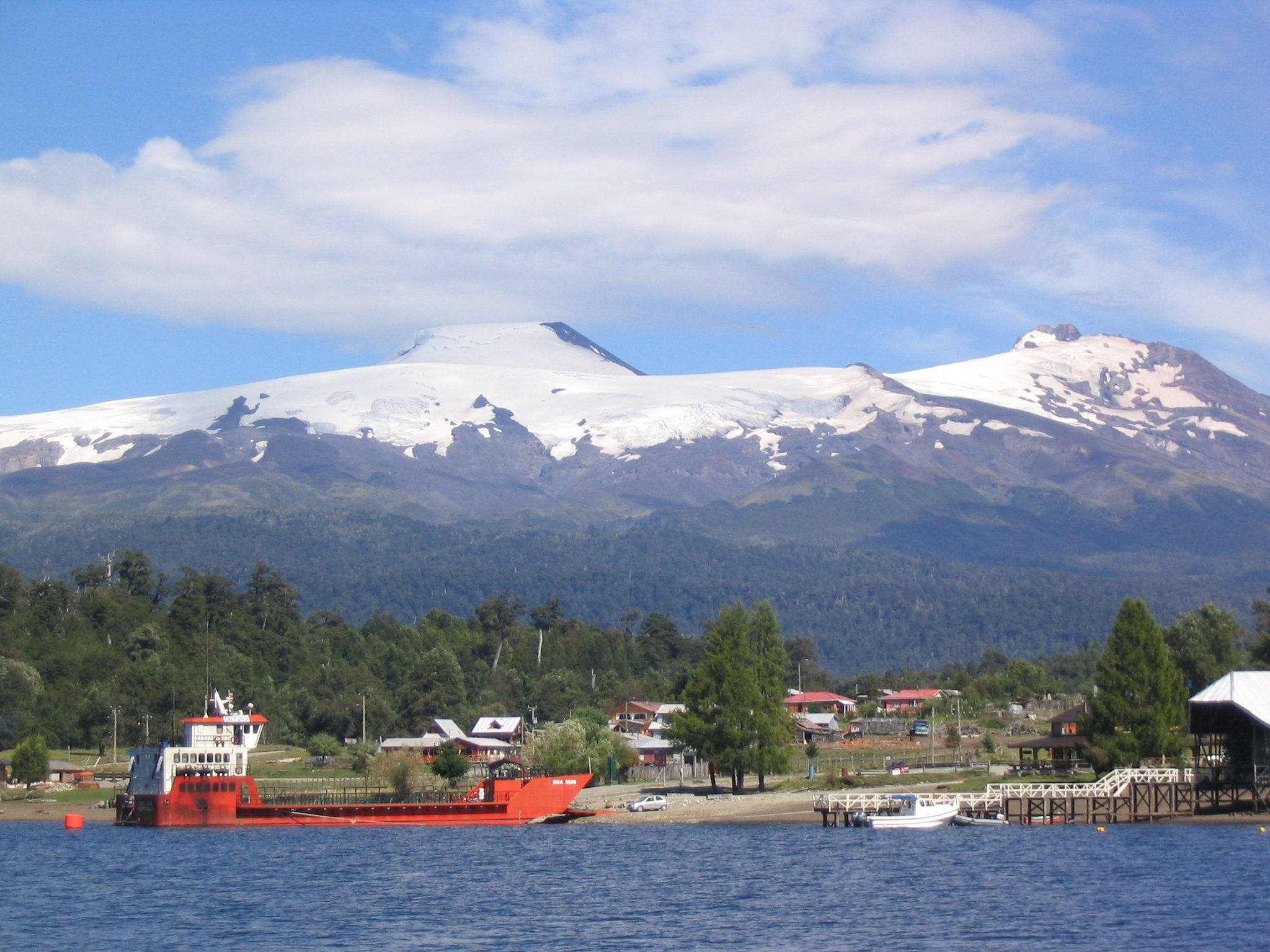 Volcán Mocho y Choshuenco. Puerto Fui, Lago Pirihueico.